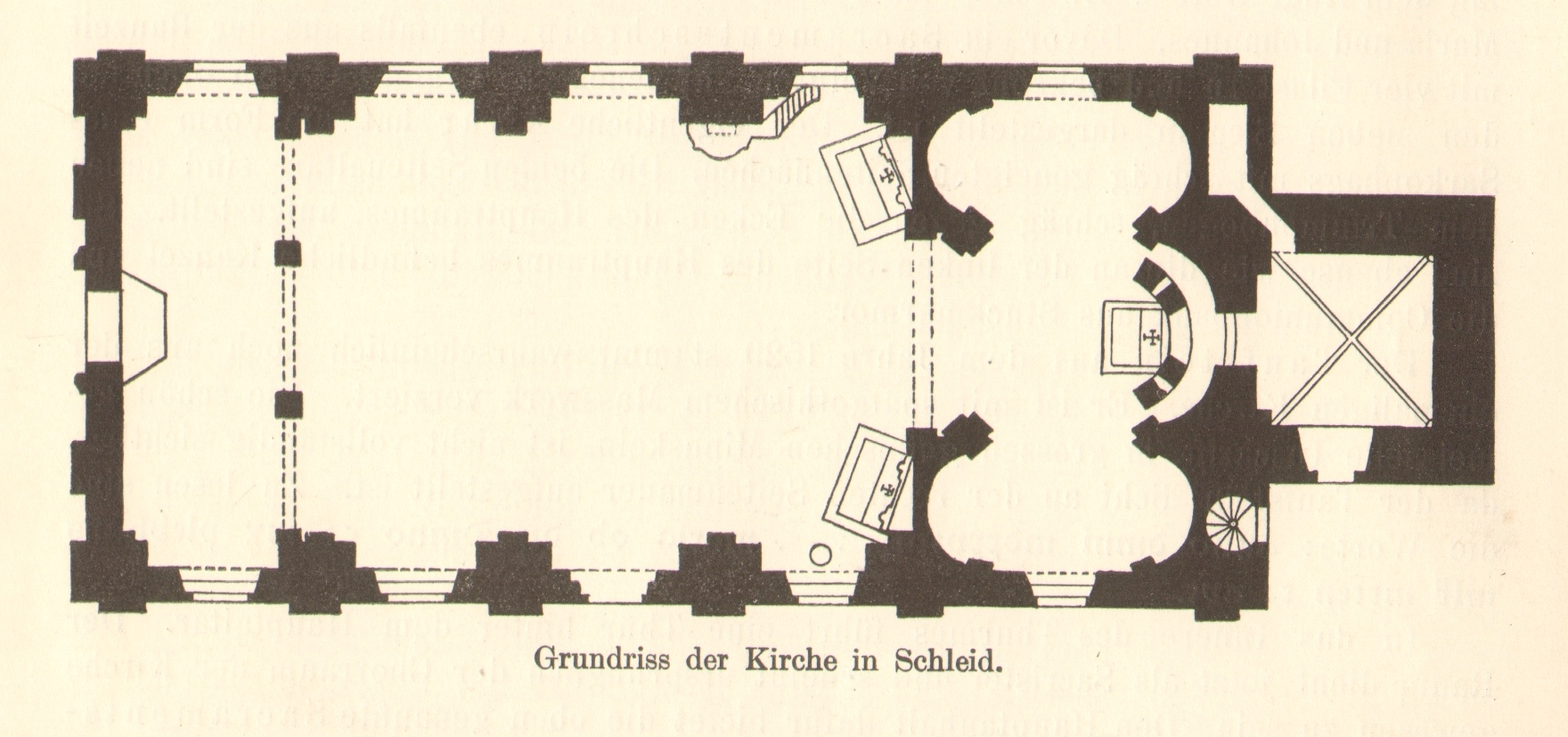 Grundriß der Kirche von Schleid.